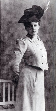 Oldra Sedlmayerová (1884 - 1954), Česká spisovatelka.